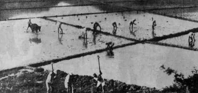 Soldiers working at Nanniwan in 1943